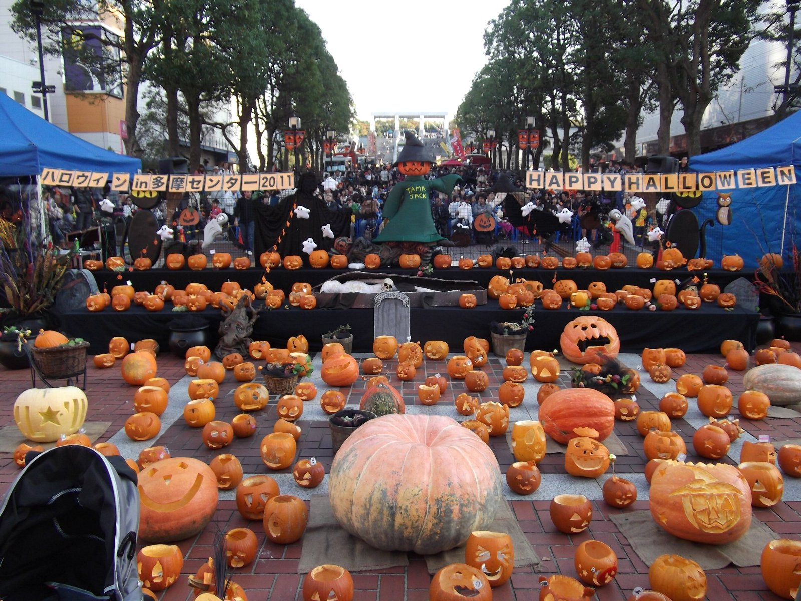 ハロウィンin多摩センター2011。東京都多摩市。